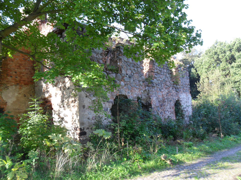 Ruiny dworu w Zimnej Brzeźnicy